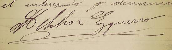 Firma de Melchor Ezquerro, promotor de las obras del Regadío de la Choza.